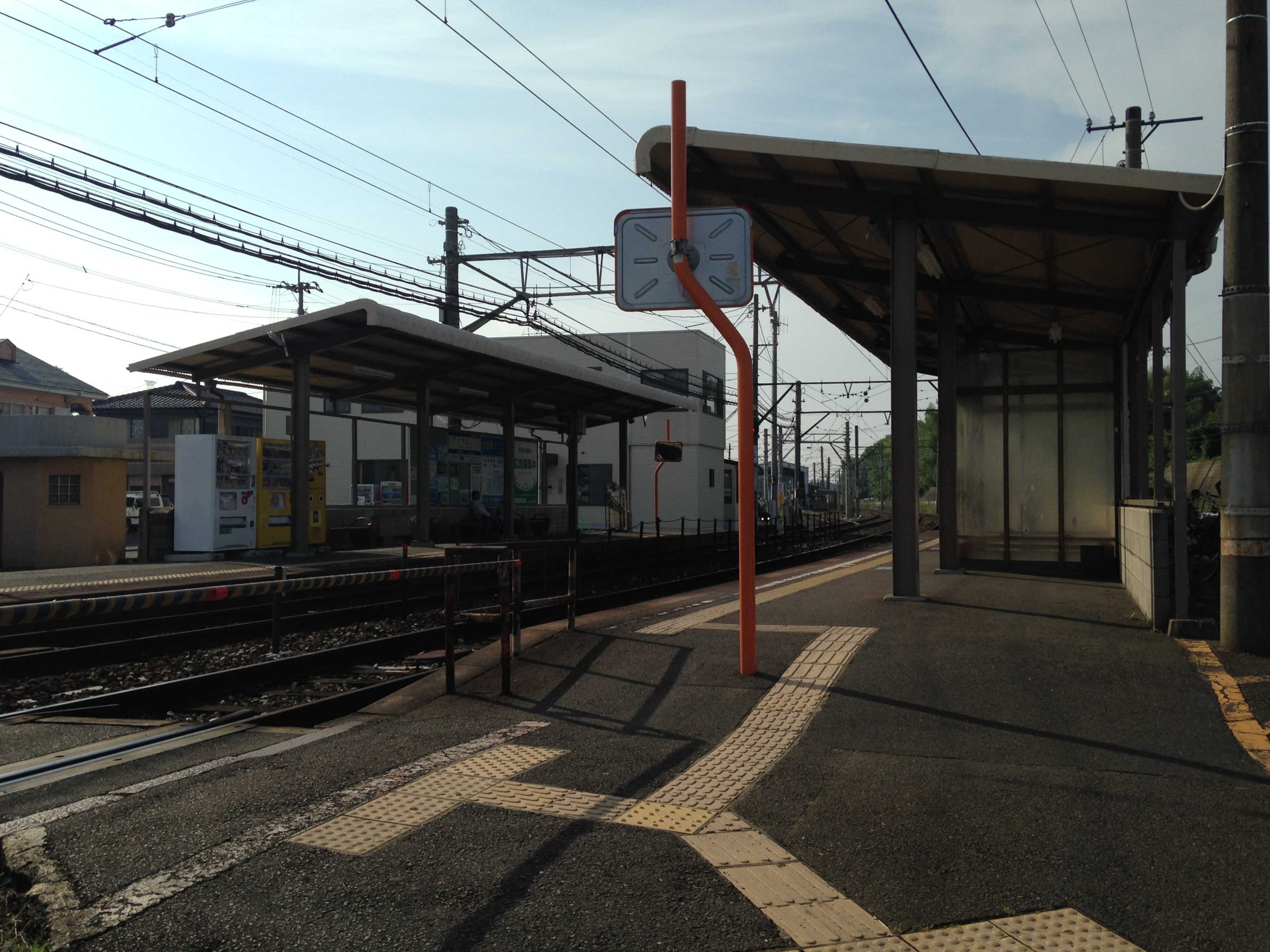 楠橋駅駅舎